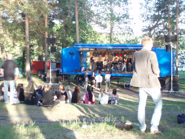 Viksholmsfestivalen 2007.